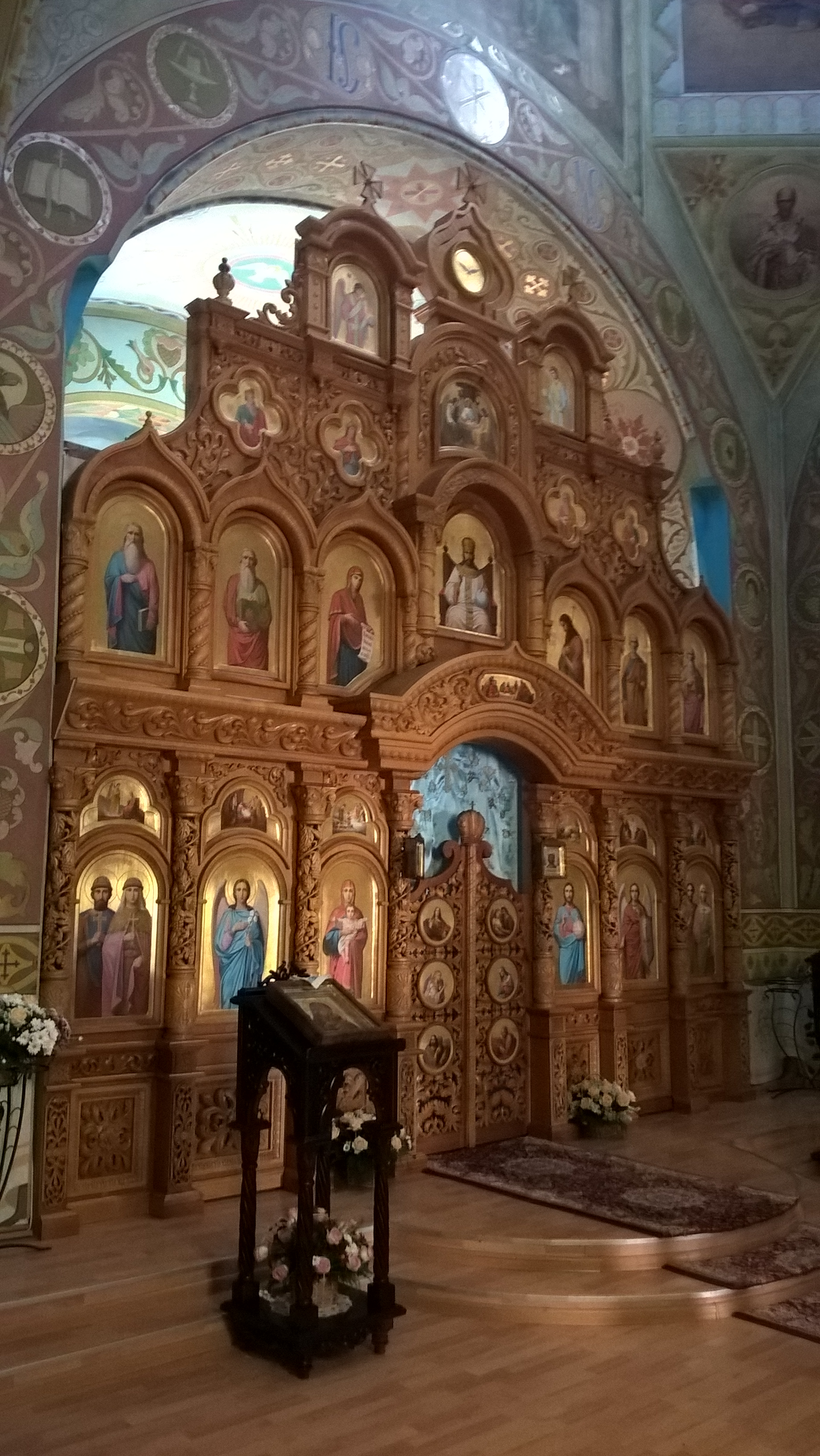 Wnętrze cerkwi Świętych Adriana i Natalii w Odessie